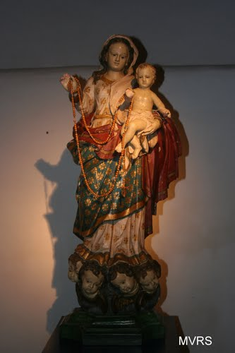 Imagem de Nossa Senhora do Rosário dos Pretos do século XVIII pertencente a extinta Igreja Nossa Senhora do Rosário dos Pretos em Pirenópolis, atualmente exibida no Museu de Arte Sacra do Carmo, na mesma cidade